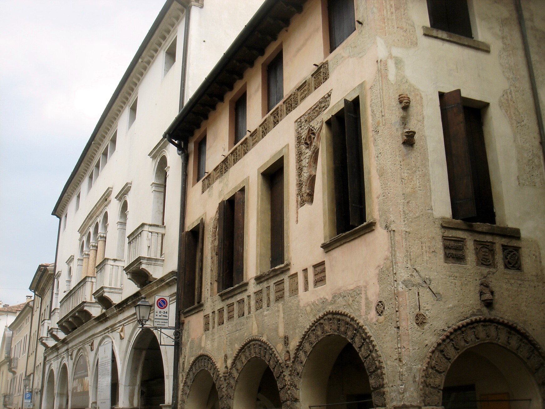 Conegliano (Treviso): Palazzo Sarcinelli, a sinistra, e Casa Longega.